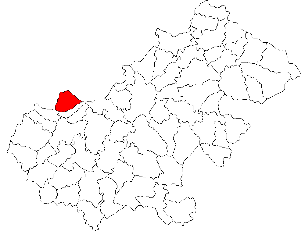 Categorie:Hărţi ale judeţului Satu Mare